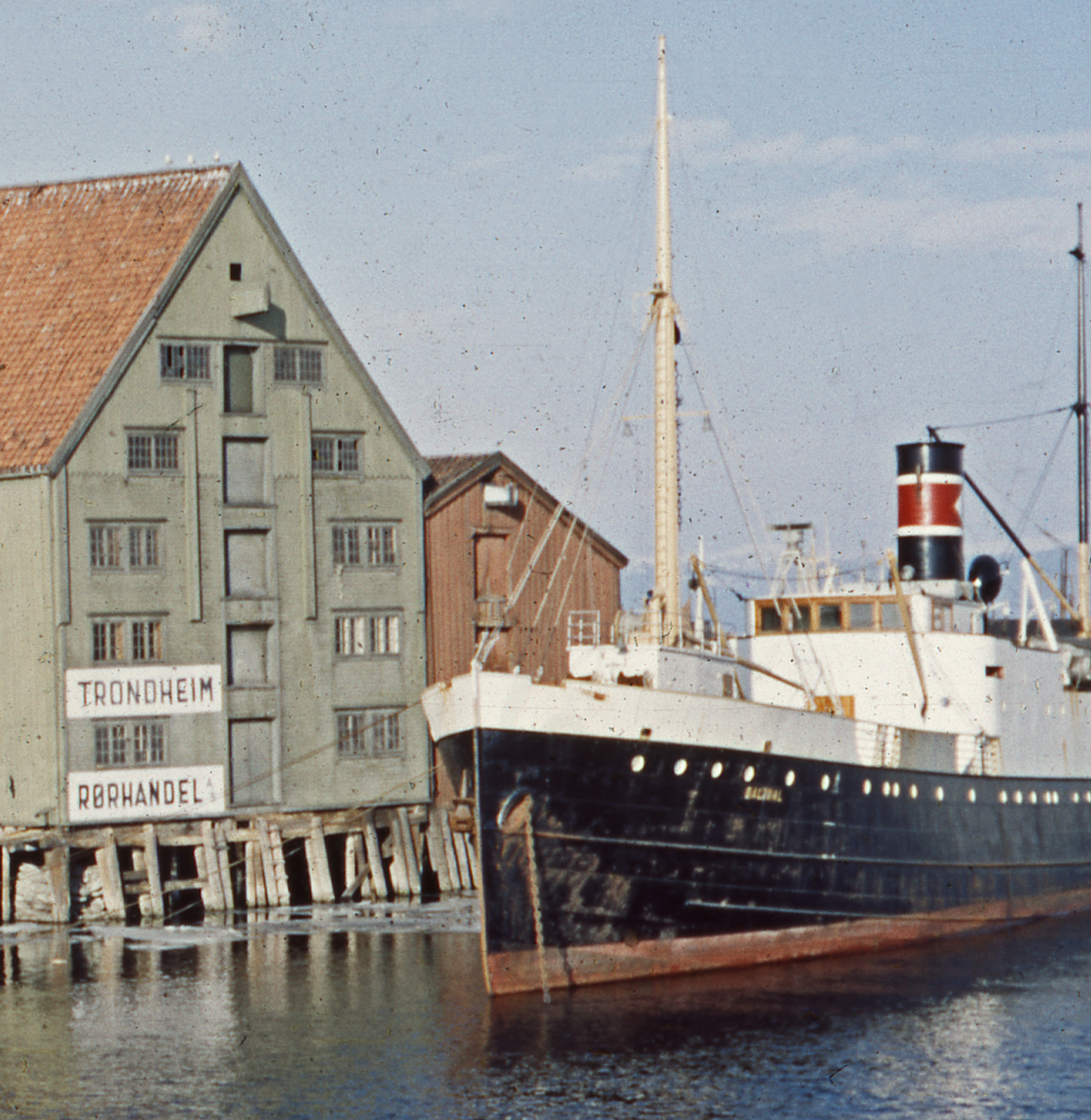 Format: Glasspositiv (Dias) Dato / Date: ca. 1954 - 1968 Fotograf / Photographer: Ukjent Sted / Place: Trondheim Wikipedia: DS "Saltdal" Eier / Owner Institution: Trondheim byarkiv, The Municipal Archives of Trondheim Arkivreferanse / Archive reference: Tor.H43.B77.F18559 Merknad: Fra Byantikvarens lysbildesamling. Bildene er merket Trondheim 1954 - 1968, men de aller fleste synes å være fra omkring 1954 / 1955.